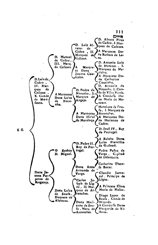 Página 111 das "Memorias Historicas e Genealogicas dos Grandes de Portugal" - Costados dos Marqueses de Cascais